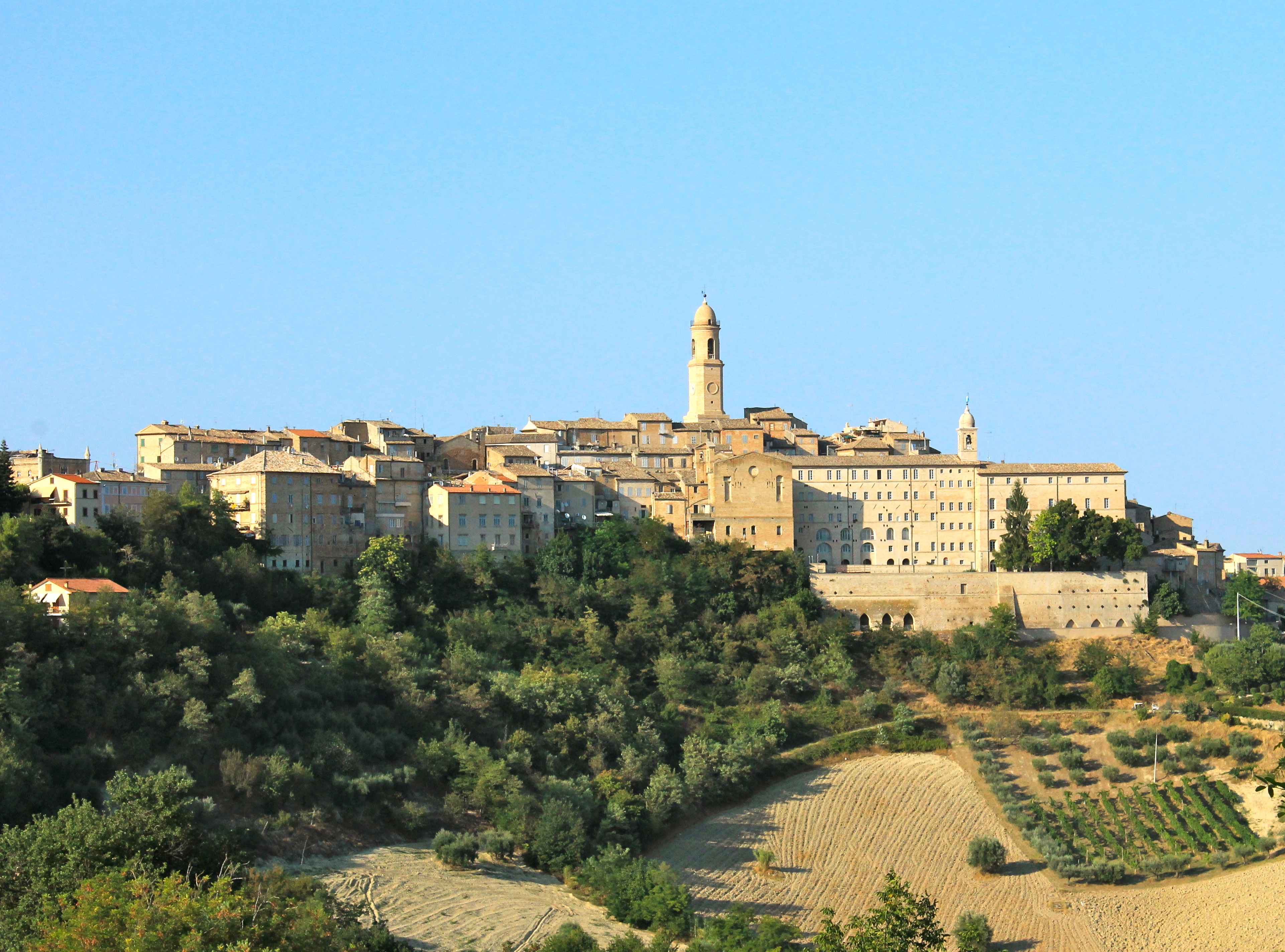 Title of the picture "Love", shooting by Monica Vitali, photographer This is a photo of a monument which is part of cultural heritage of Italy.